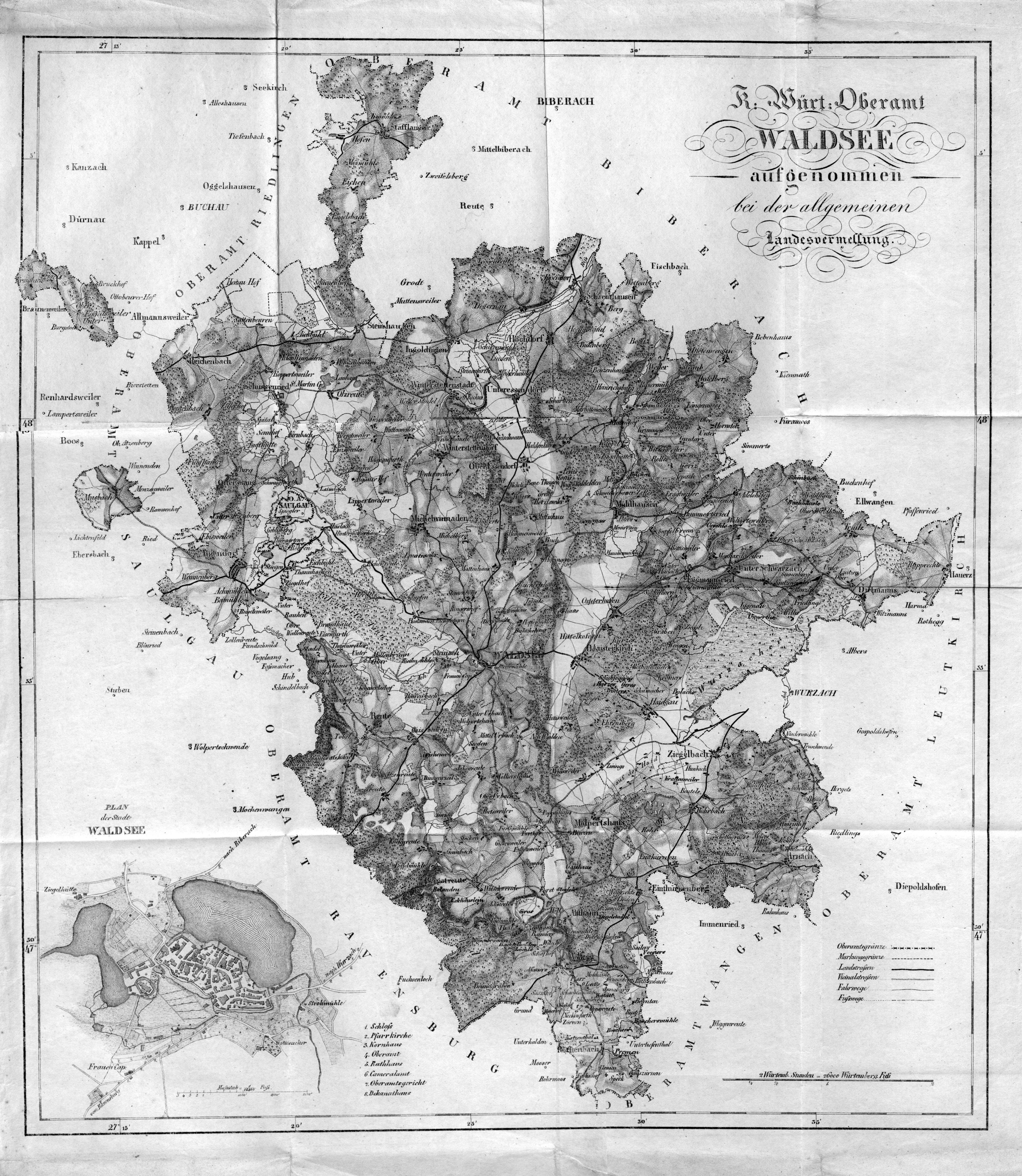 Karte des Oberamts Waldsee (Württemberg), Beilage zu: Beschreibung des Oberamts Waldsee